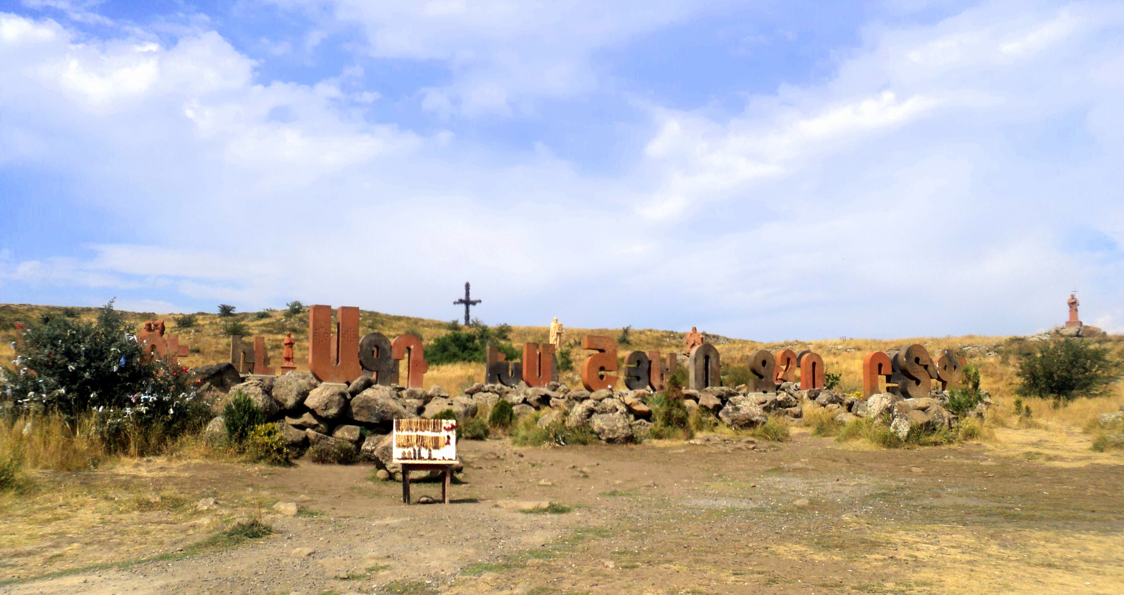 Հայոց այբուբենի հուշարձան, Արտաշավան